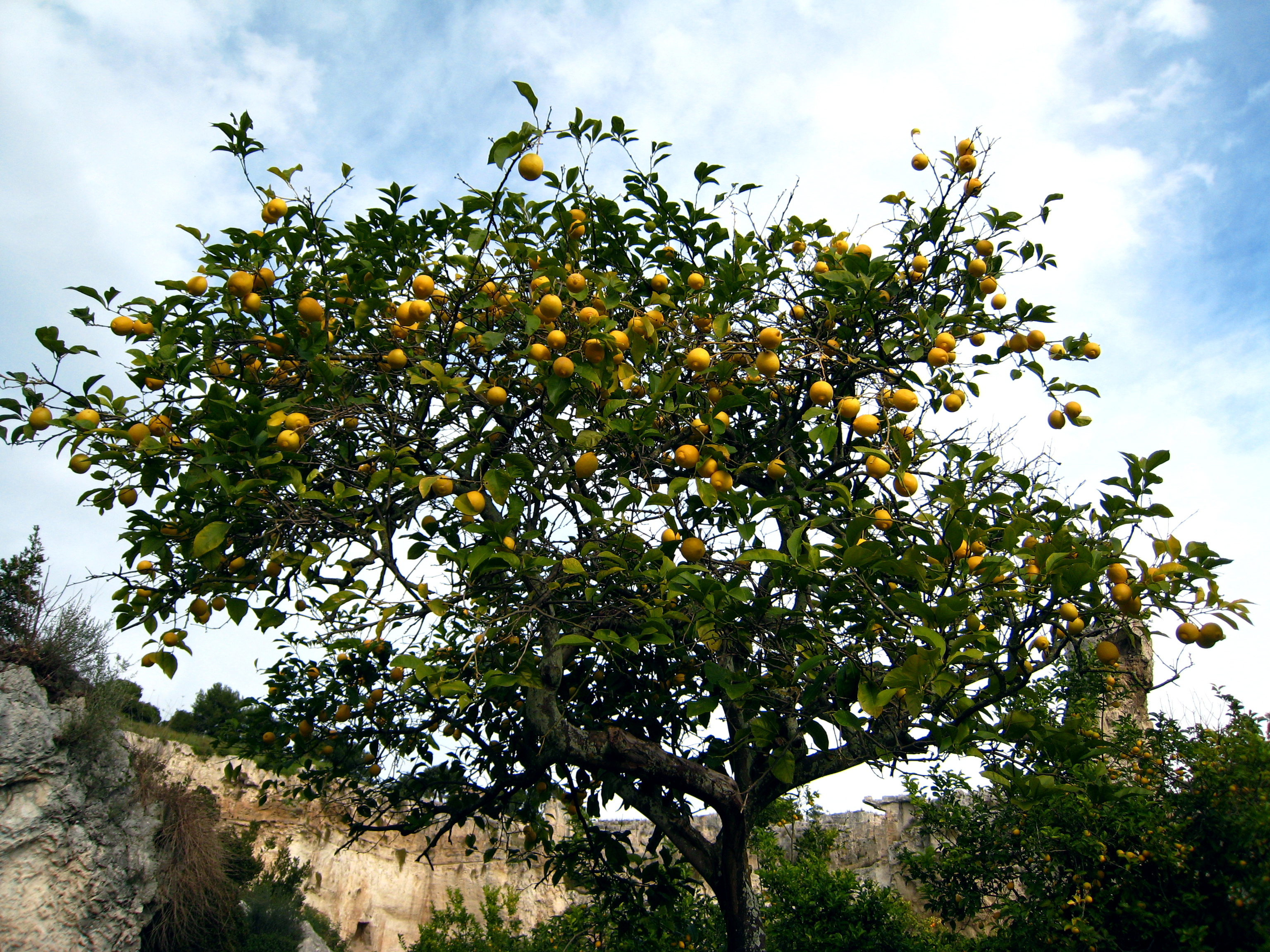 Albero di limoni all'interno dell'Area archeologica della Neapolis